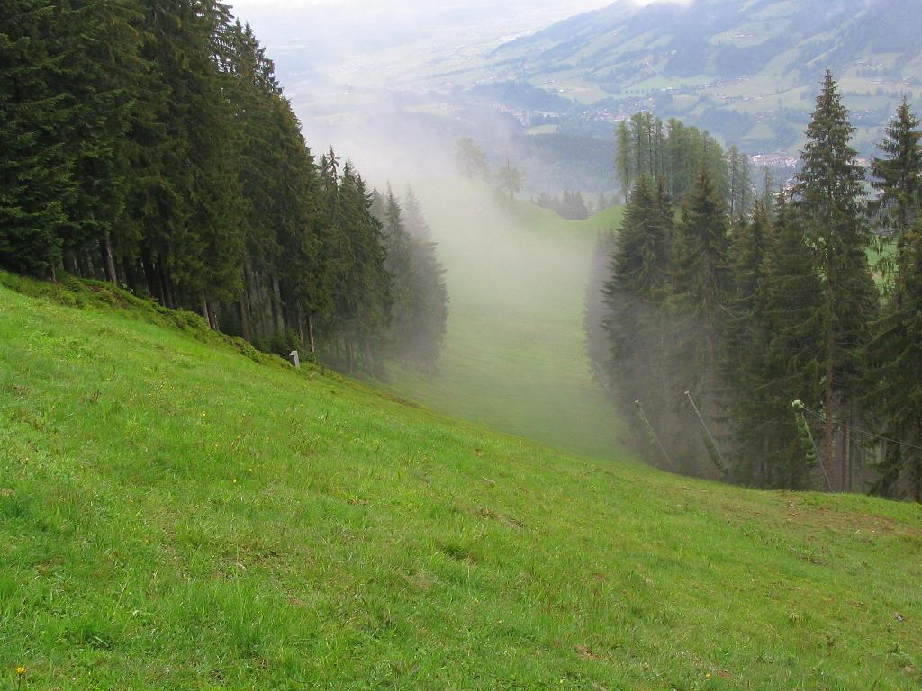 Ein Teil (= alte Schneise) der Weltcupabfahrt Streif in Kitzbühel